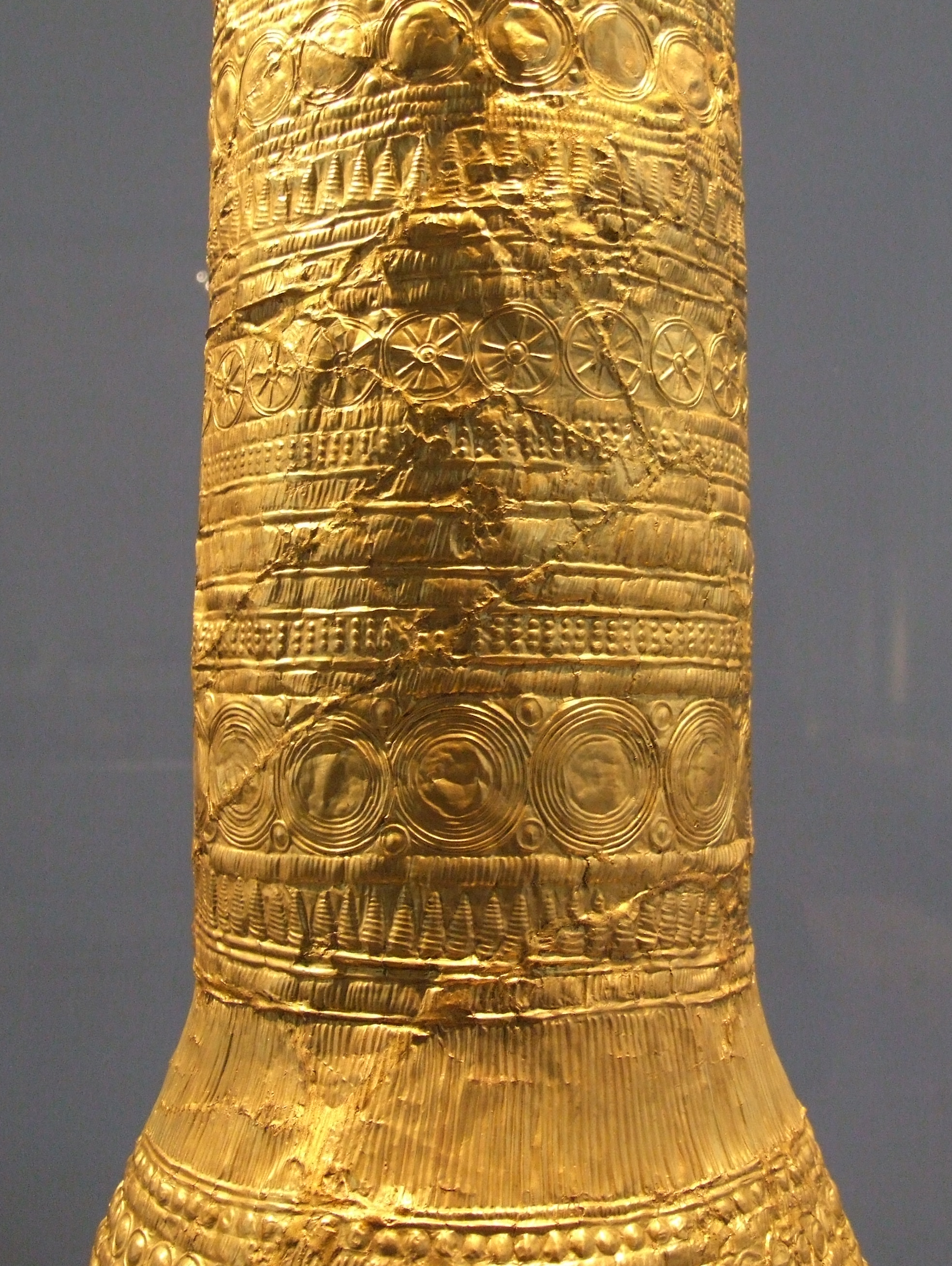 Goldblechkegel von Ezelsdorf-Buch - 4 - Übergang vom Schaft zur Basis, Germanisches Nationalmuseum ( Nürnberg / Deutschland ), Urnenfelder Kultur, 11.-9.Jhdt. v.Chr. - Detail.